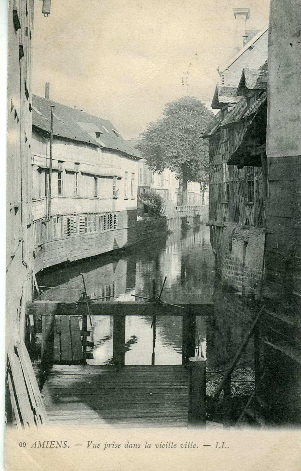 Carte postale ancienne éditée par LL, n°69 : AMIENS - Vue prise dans la vieille ville